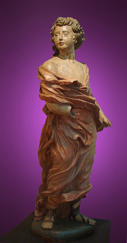 Anjo, século XVIII, importante exemplar de Arte Missioneira pertencente ao acervo do Museu Júlio de Castilhos, em Porto Alegre, Brasil.